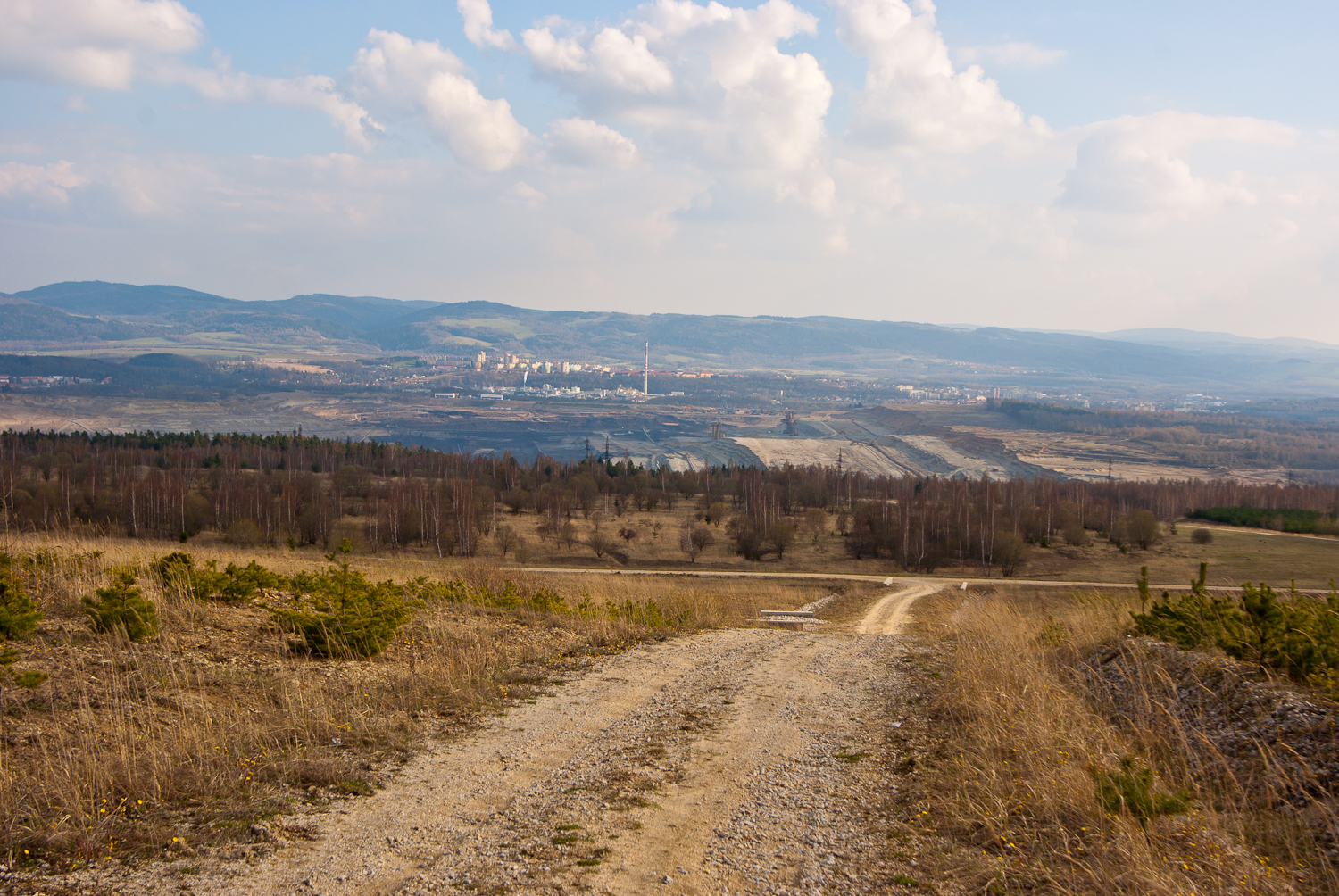 Velká podkrušnohorská výsypka, okres Sokolov